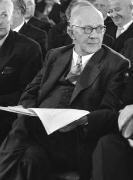 Das Bild zeigt den damaligen nordrhein-westfälischen Justizminister Rudolf Amelunxen in der Bundesversammlung am 17. Juli 1954 in Berlin. Es ist ein Ausschnitt aus dem Bild File:Bundesarchiv B 145 Bild-F001946-0009, Berlin, Bundesversammlung wählt Bundespräsident.jpg